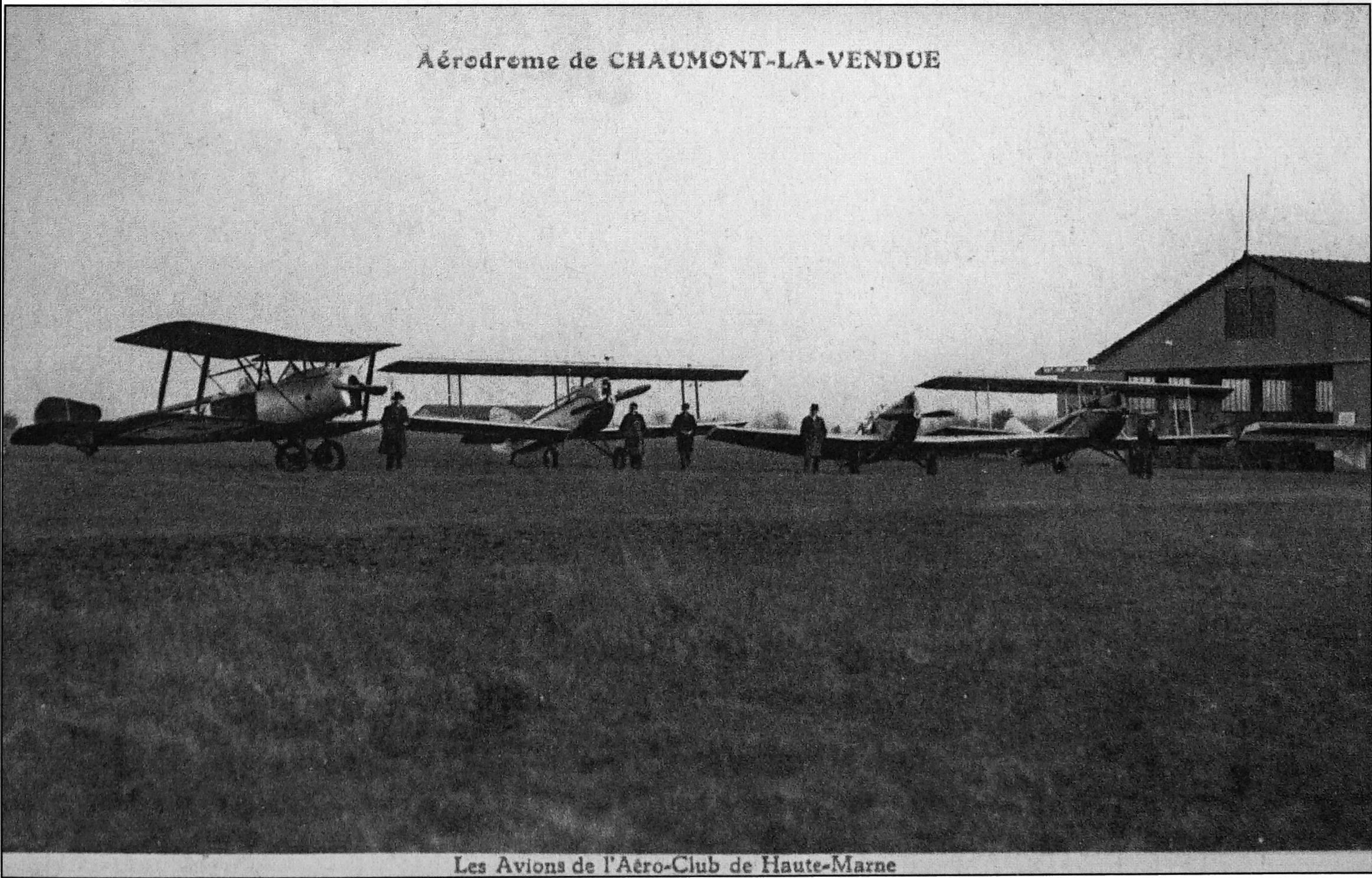 sur une vue ancienne.